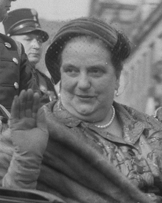 Collectie / Archief : Fotocollectie Anefo Reportage / Serie : [ onbekend ] Beschrijving : Staatsbezoek Franse president Coty aan Nederland. Amsterdam, middag rijtoer, rijtuig met mevrouw Coty en prins Bernhard. Datum : 21 juli 1954 Locatie : Amsterdam, Noord-Holland Trefwoorden : prinsen, rijtoeren, staatsbezoeken Persoonsnaam : Bernhard, prins, Coty, René Fotograaf : Rossem, Wim van / Anefo Auteursrechthebbende : Nationaal Archief Materiaalsoort : Negatief (zwart/wit) Nummer archiefinventaris : bekijk toegang 2.24.01.04 Bestanddeelnummer : 906-6085